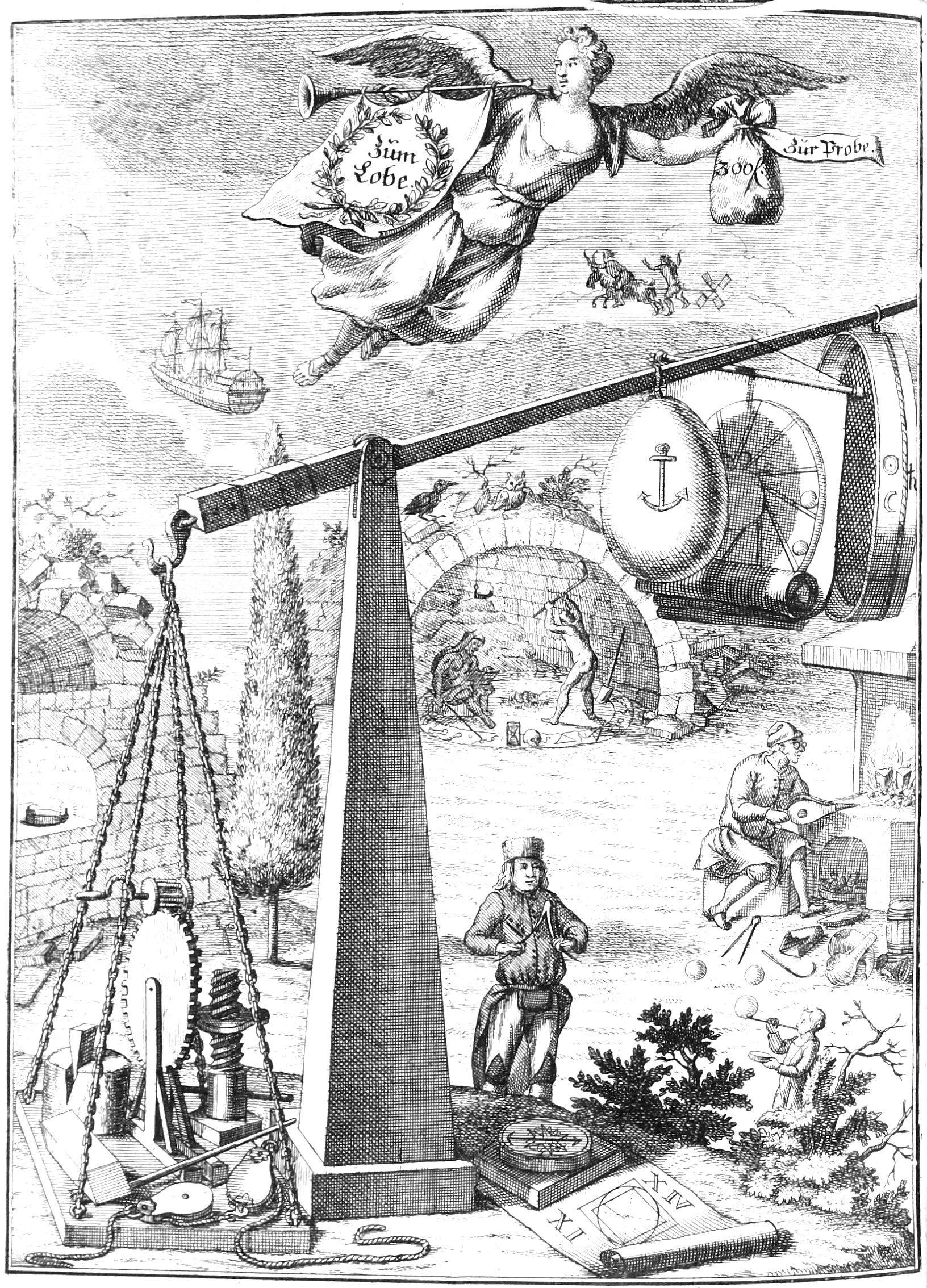 Ilustracja z książki Aufmunterung an alle, welche ein perpetuum mobile mechanicum ... Andreasa Gärtnera